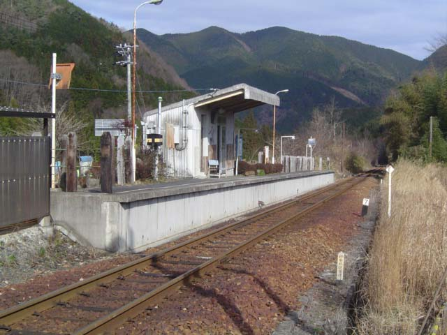 明知鉄道飯沼駅 投稿者が撮影（2004年12月22日）